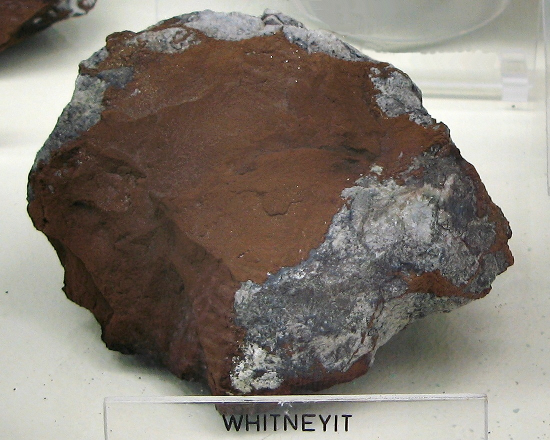 Whitneyit, Gemenge aus Algodonit und arsenhaltigem gediegen Kupfer - Fundort: Houghton County, Michigan, USA - Ausgestellt im Mineralogischen Museum Bonn